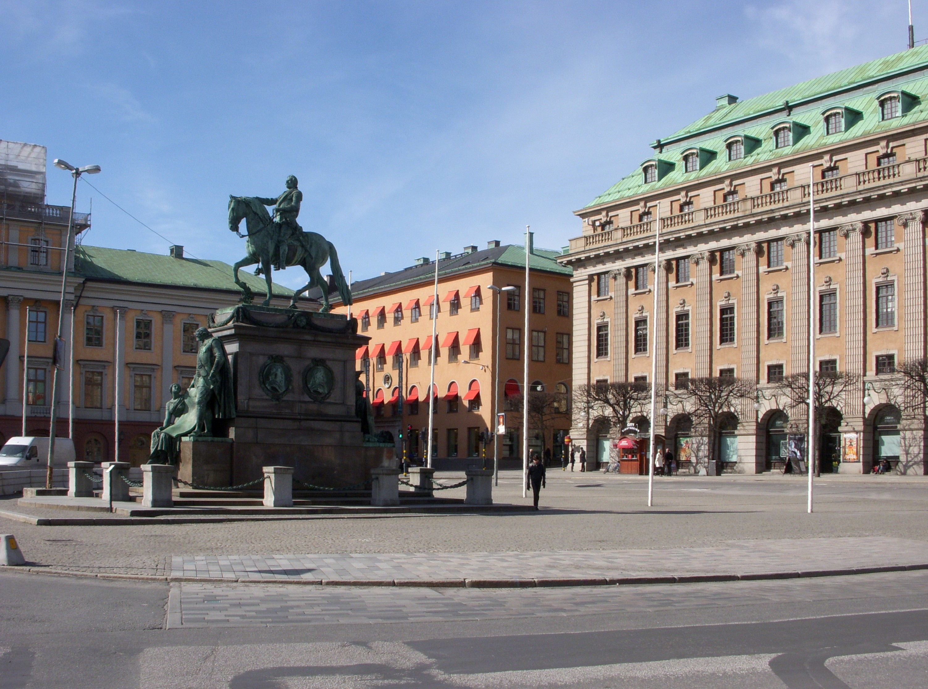 Gustaf Adolfs torg i Stockholm, vy mot väst